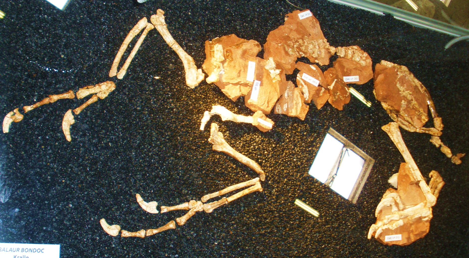 Fossil of Balaur, an extinct theropod- Took the photo at Fossil Show, Munich